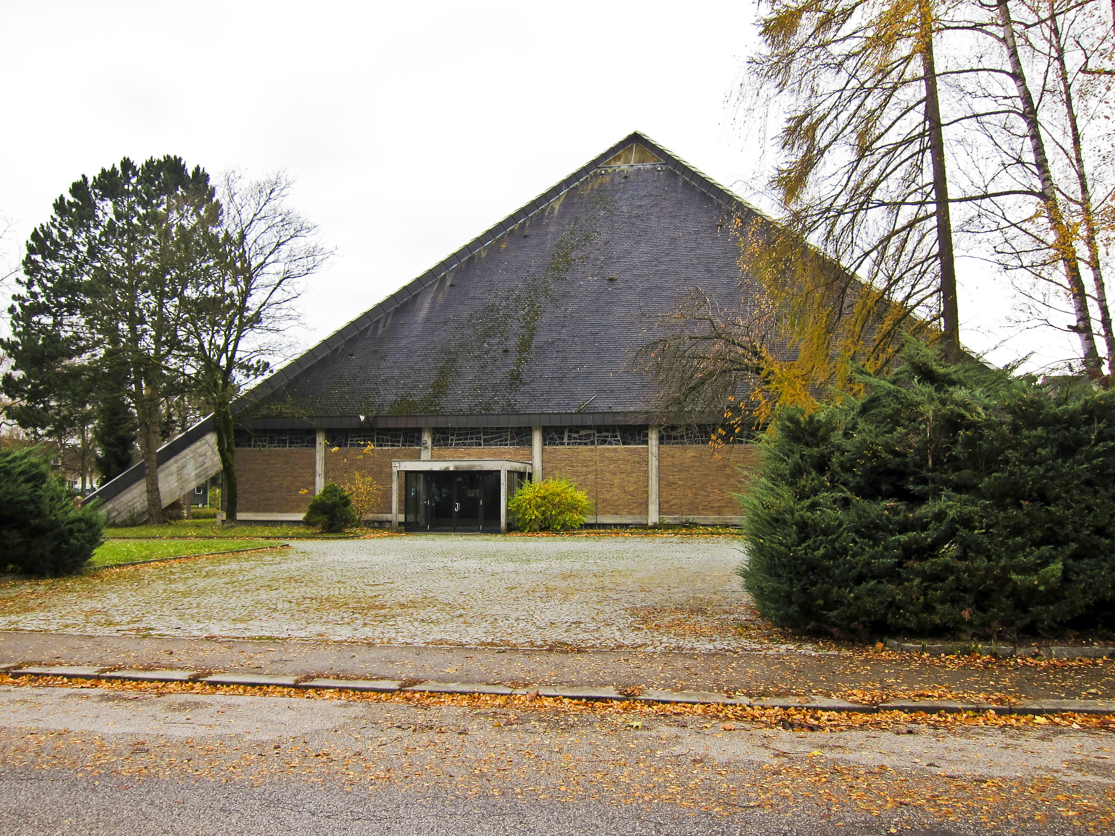 Zeltkirche Lichtenegg, Kreuzung Königsederstrasse / Dragonerstrasse, 4600 Wels